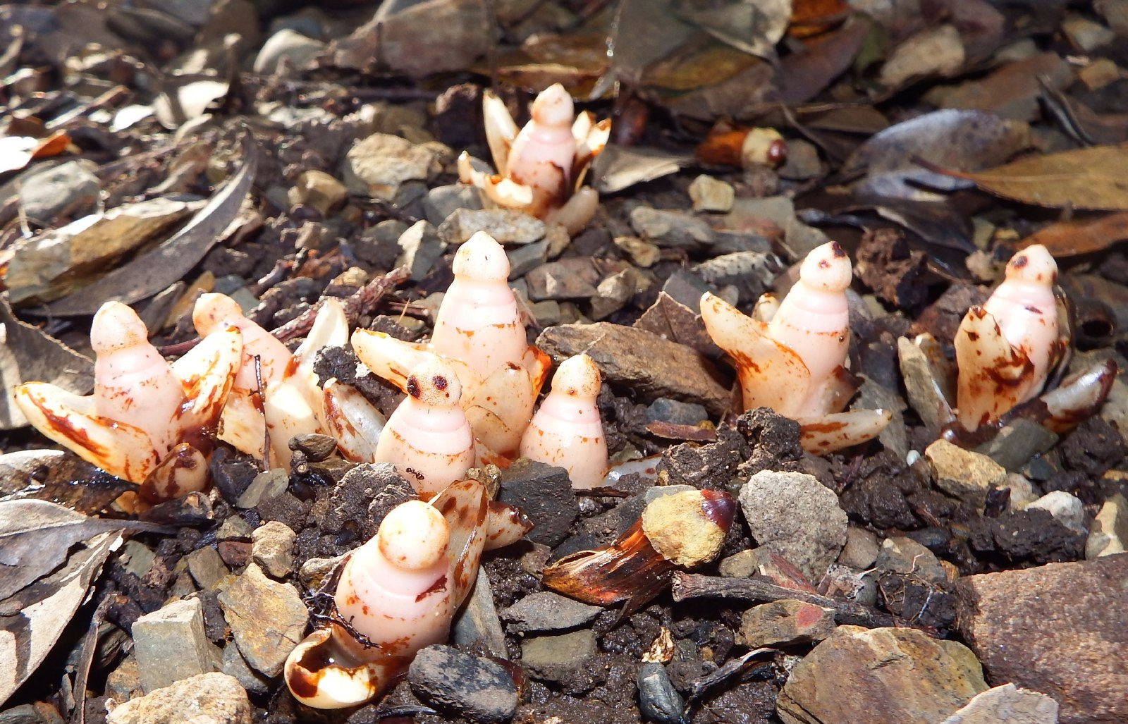 金剛頂寺のヤッコソウ（２０１６．１１．２８撮影）